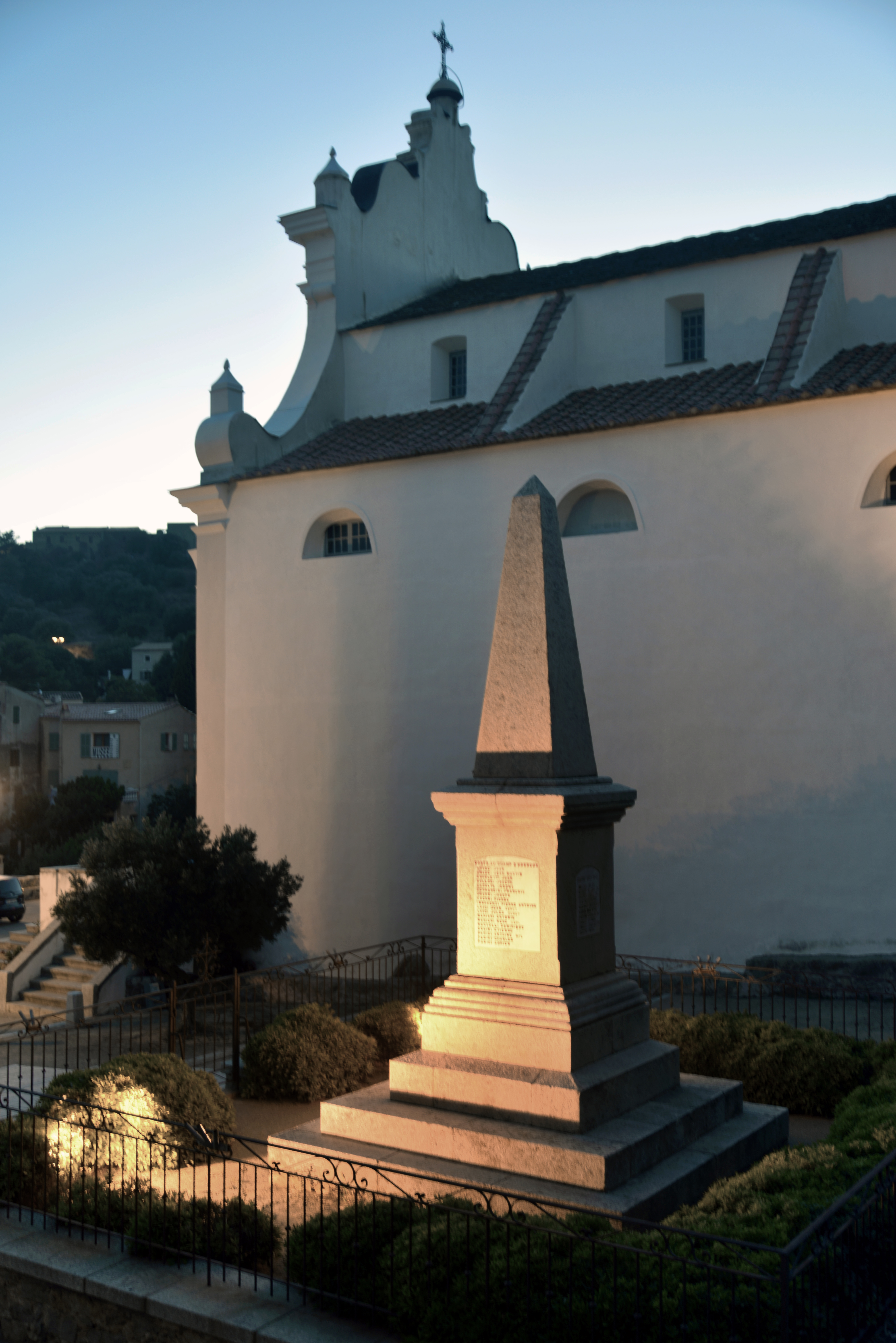 Corbara, Balagne (Corse) - Monument aux morts, à côté de l'église-collégiale paroissiale de l'Annonciation.